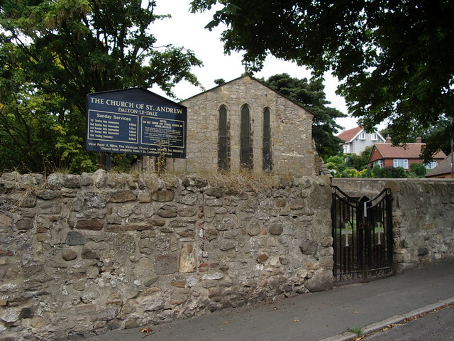 St Andrew's Church Dalton-Le-Dale